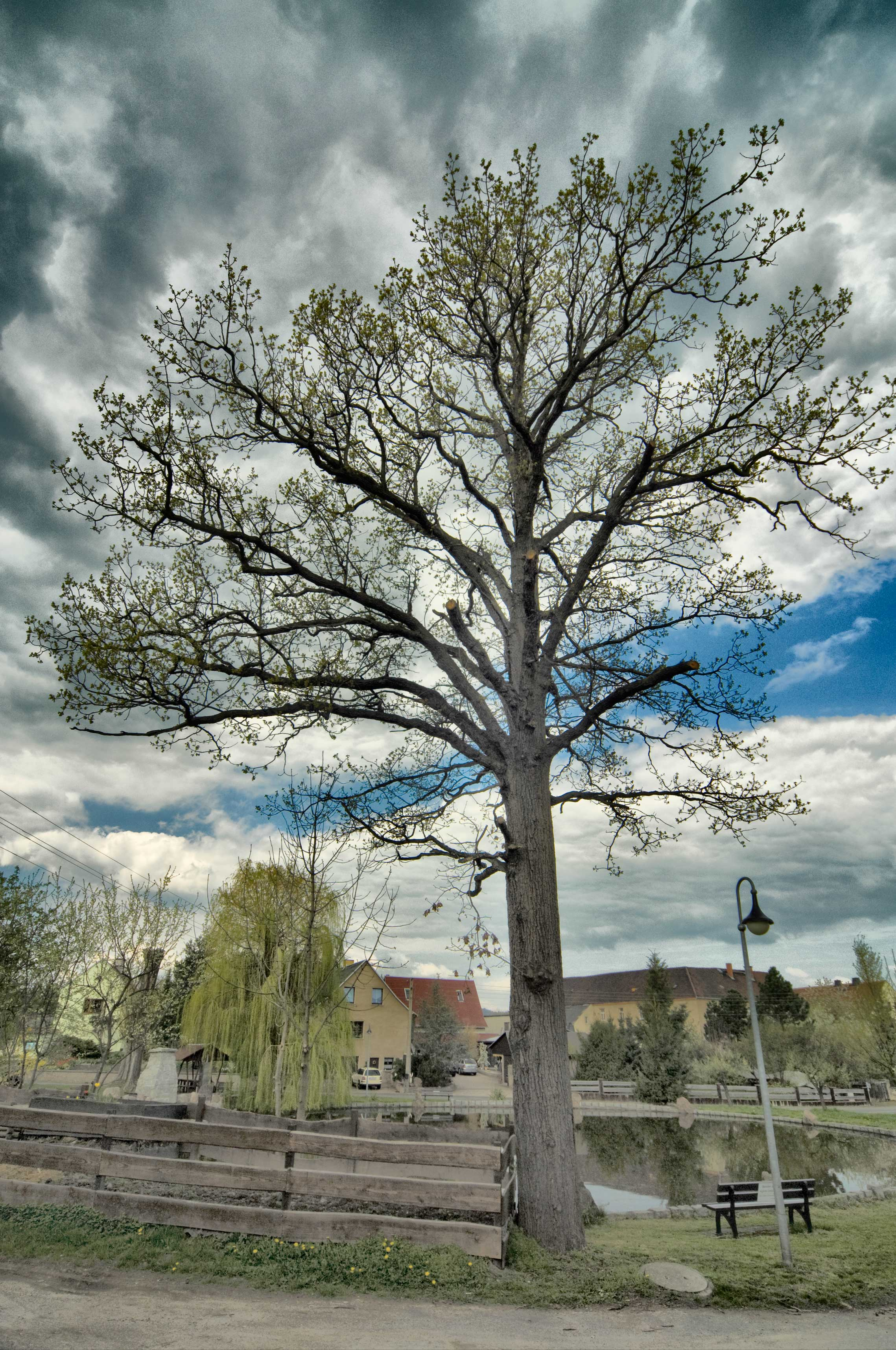 Eiche im Dorfzentrum am Anger in Lampersdorf, Gemeinde Wermsdorf in Sachsen